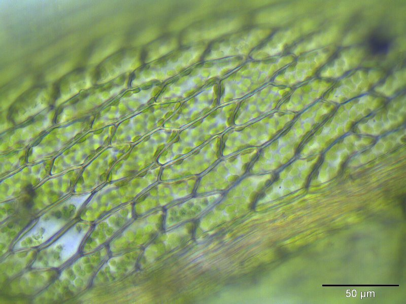 Haarblättriges Birnmoos (Bryum capillare s. l.), Laminazellen, 400x Vergrößerung